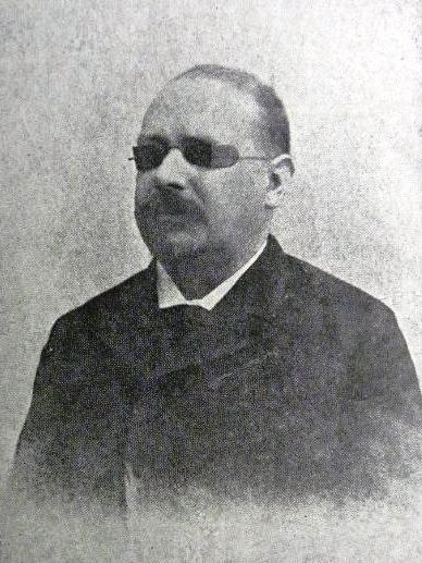 Valentin Lamas Carvajal, escriptor gallec (1849-1906)